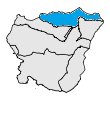 La comuna de Puigbalador en el Conflent, a partir d'un mapa de lliure disposició.